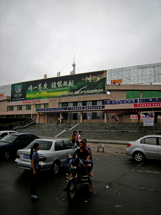 溆浦火车站外